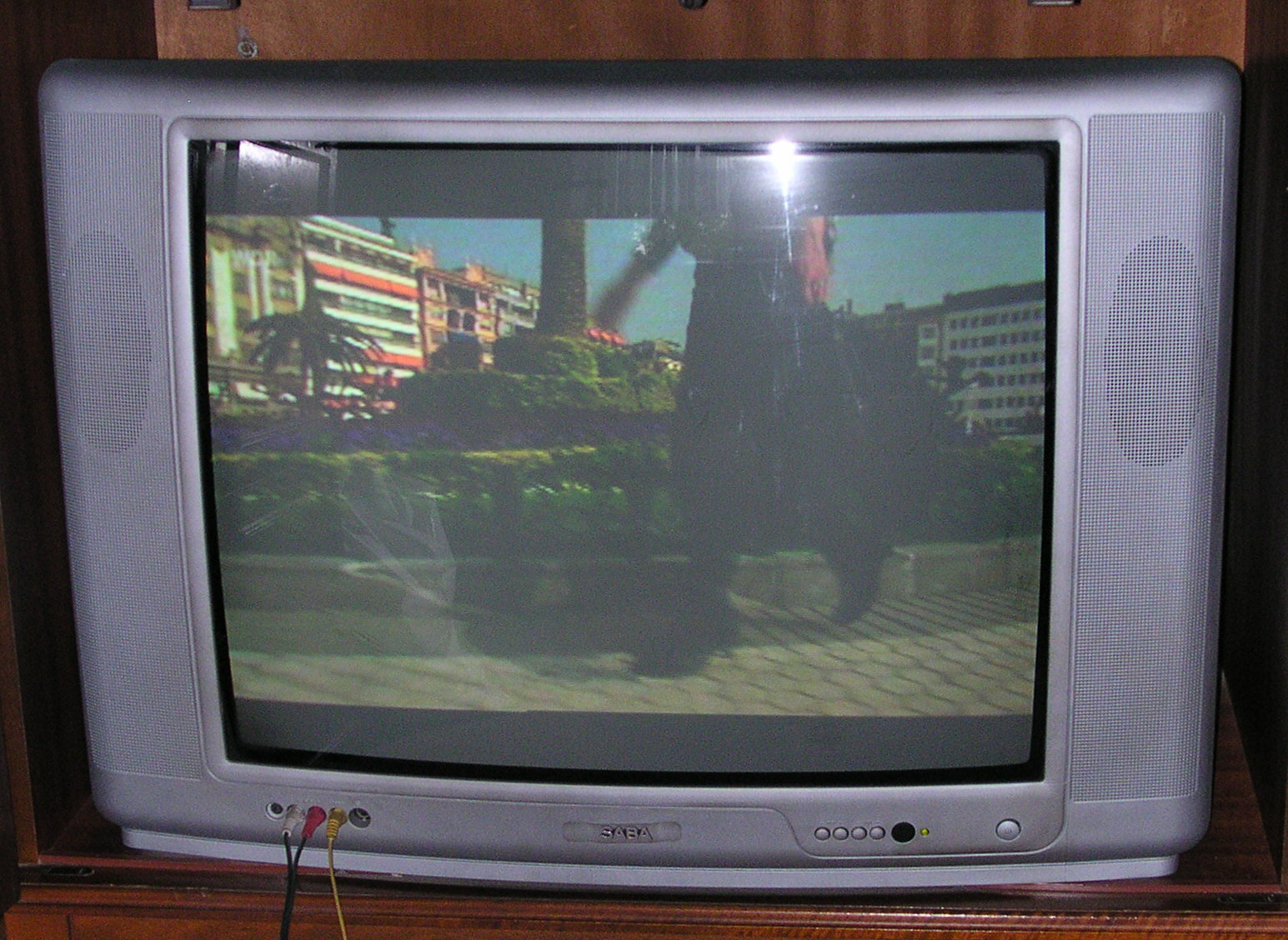 SABA Stereo Fernsehgerät, 70cm Diagonale, ca. 2004